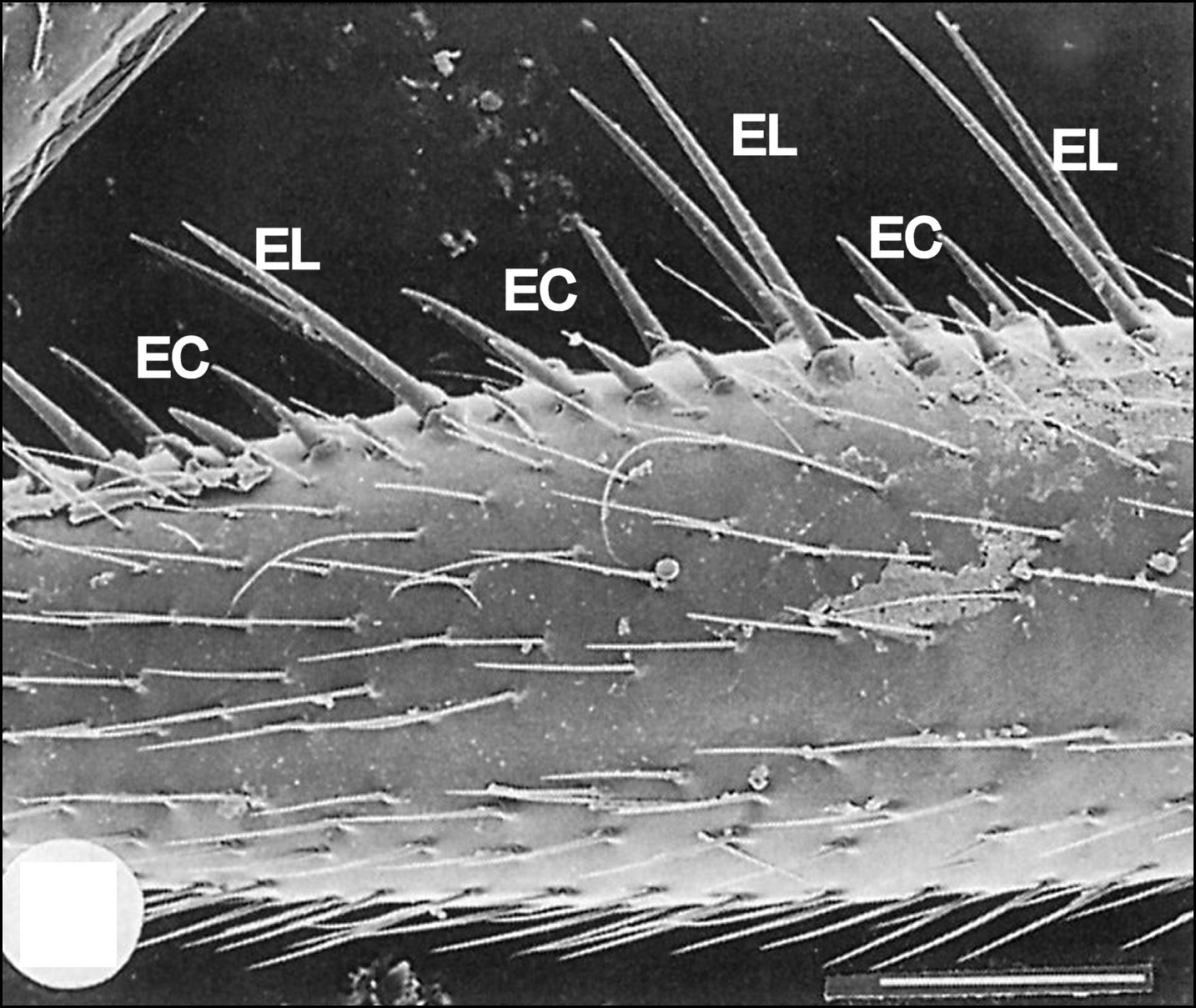 Epines de longueurs différentes sur le deuxième fémur d' Arachnocoris thesauri vues au microscope électronique à balayage.